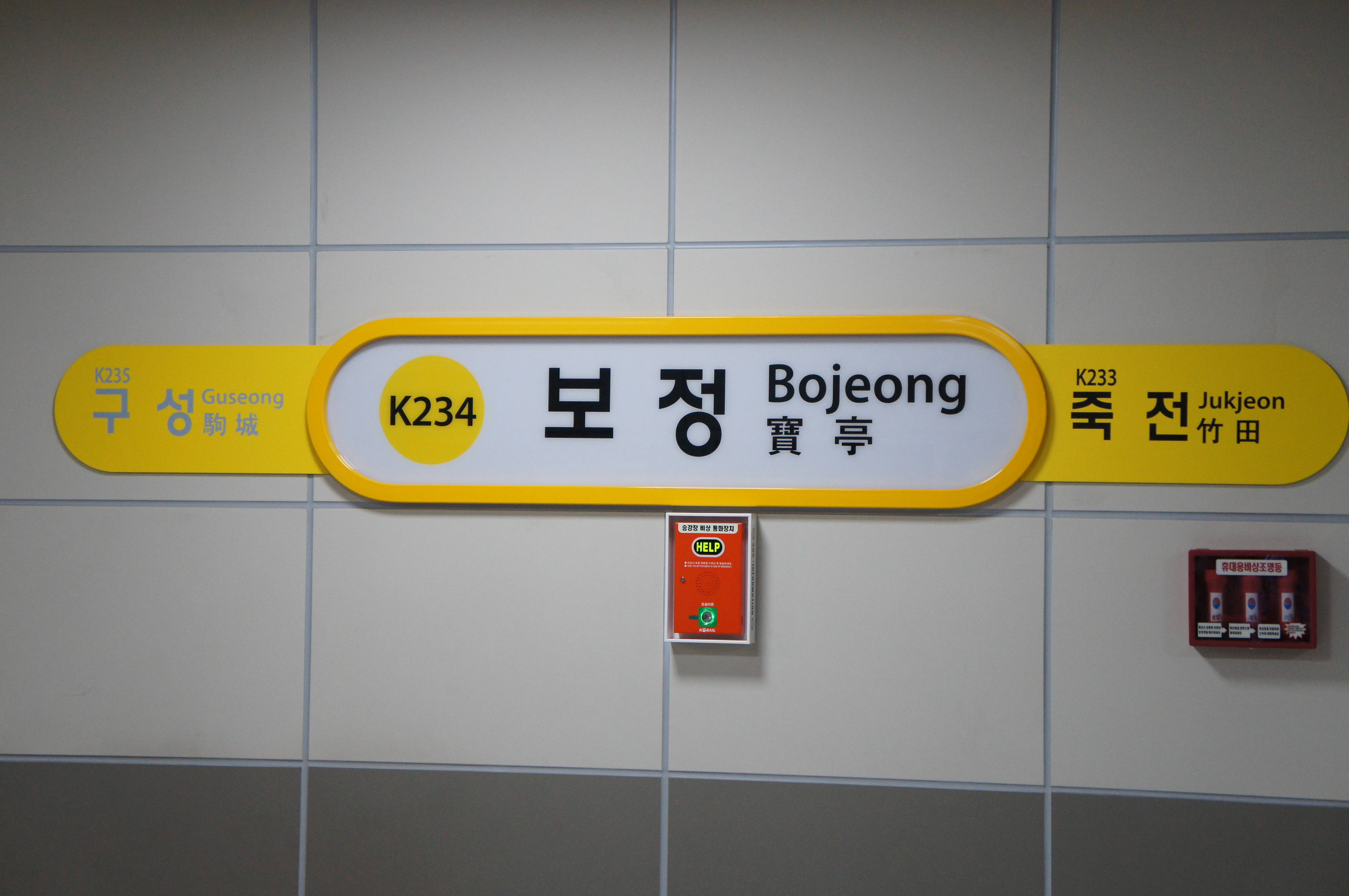 보정역 역명판